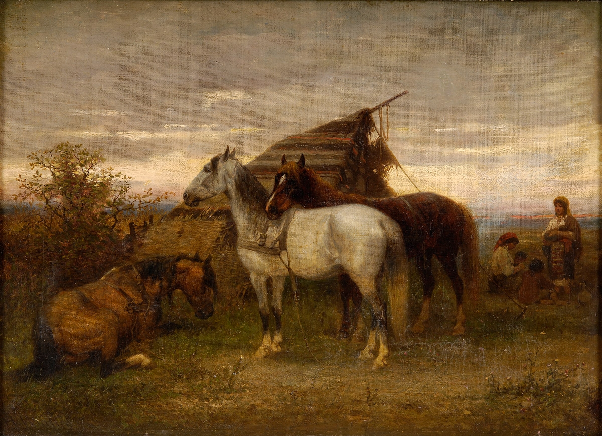 Das Nachtlager. Signiert. Öl auf Leinwand, 33 x 45 cm